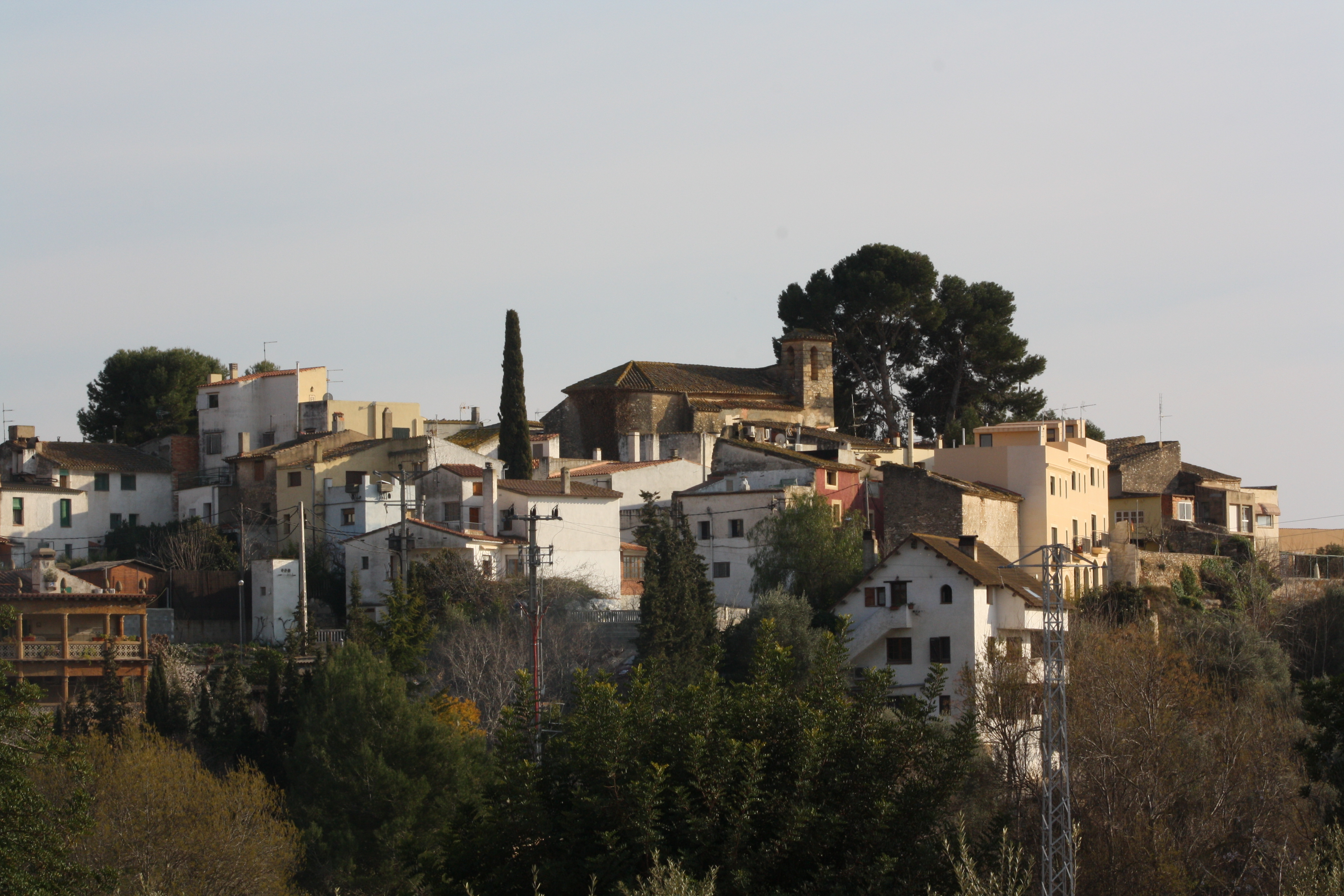 Fotografia de Renau